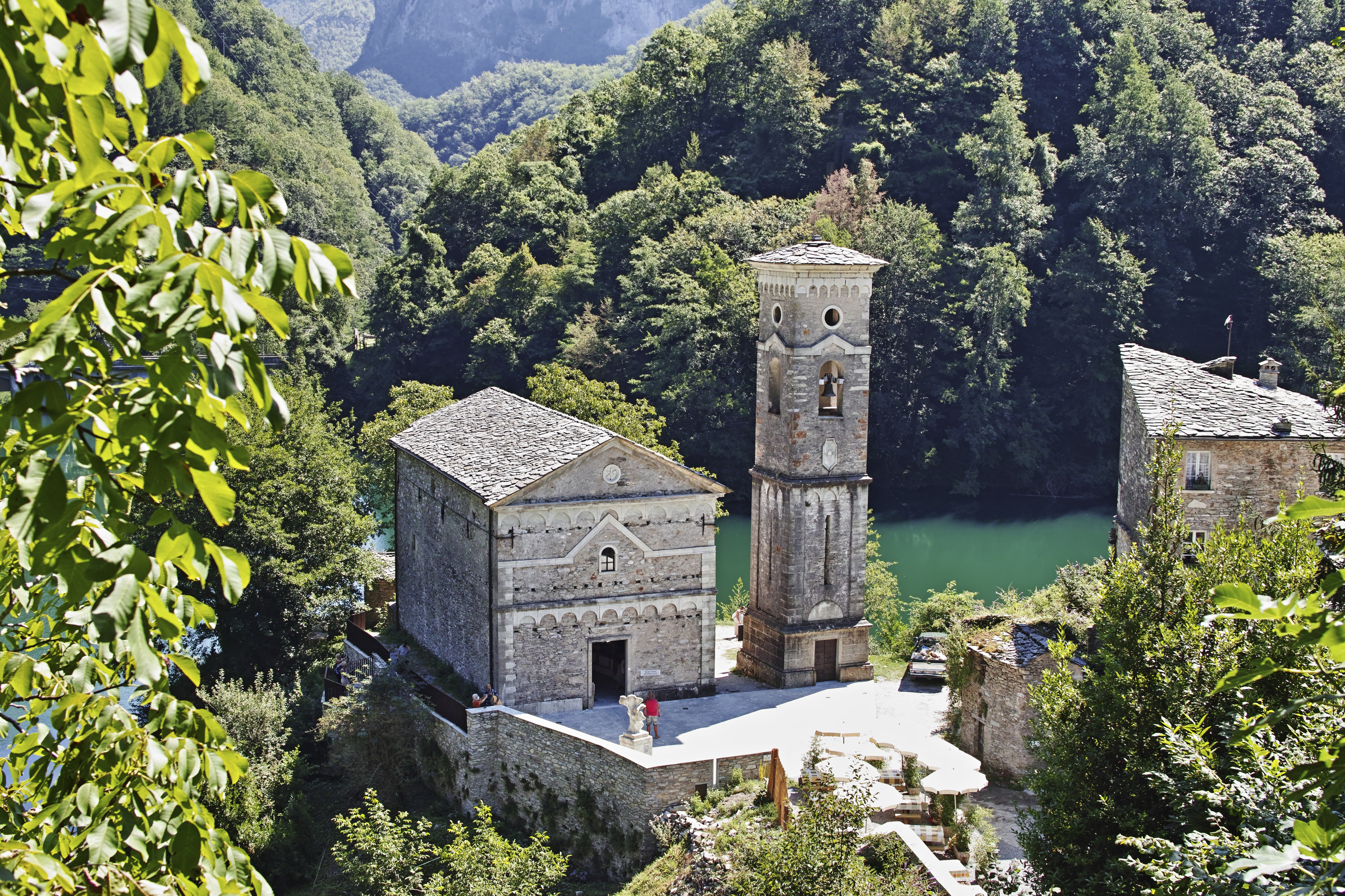 Isola Santa, Chiesa di San Jacopo.